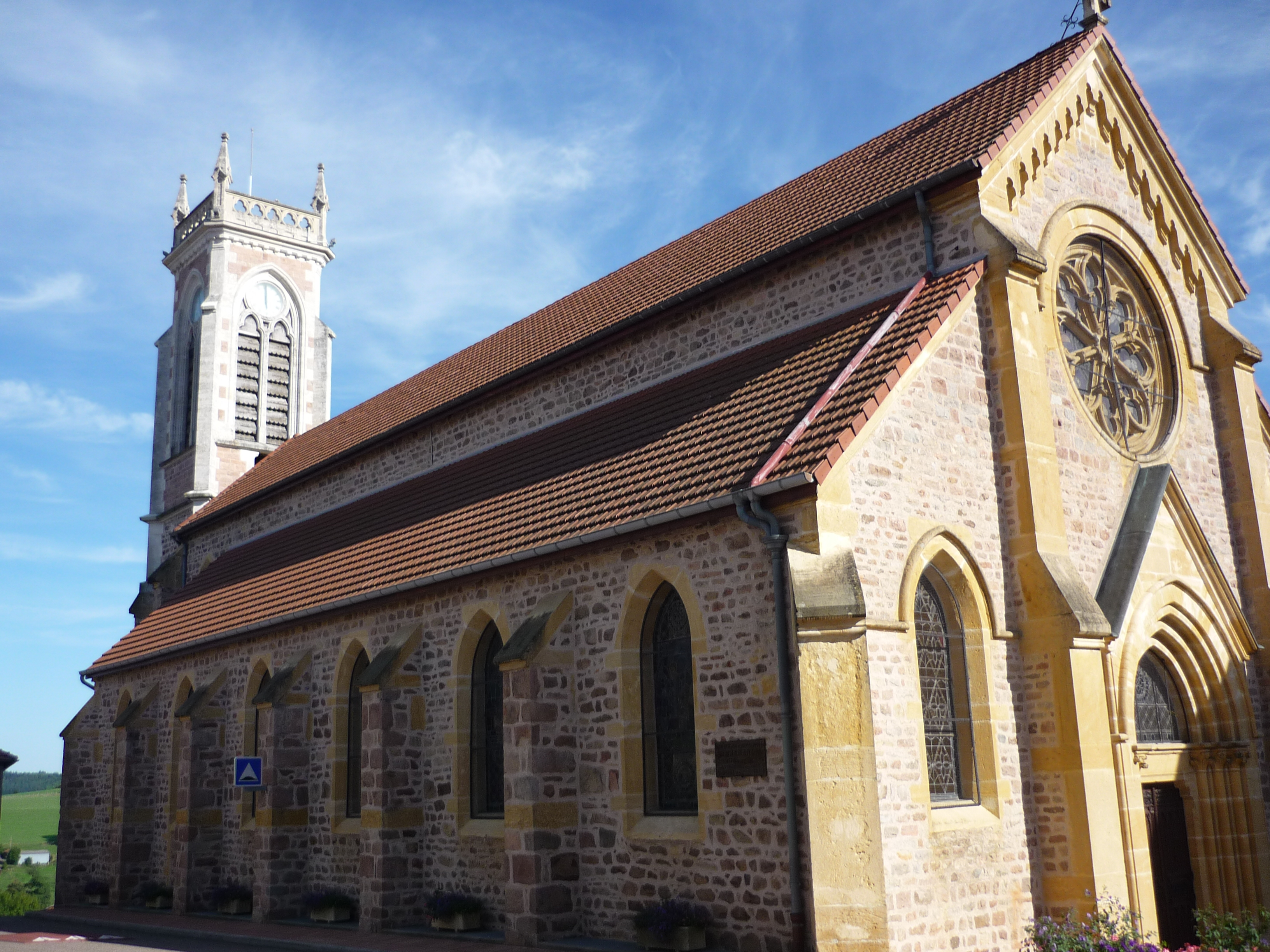 Église de Marnand, dans le département du Rhône